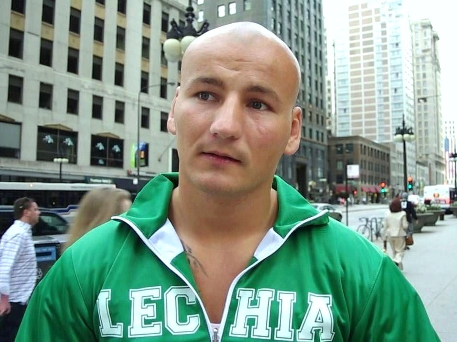 Pięściarz Artur Szpilka w Chicago.